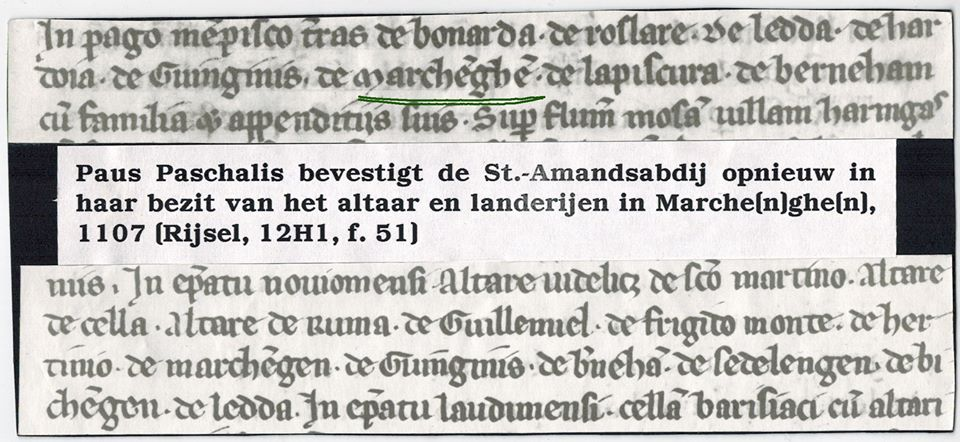 1107: Paus Paschalis bevestigt de St.-Amandsabdij opnieuw in haar bezit van het altaar en landerijen in Marche(n)ghe(n).